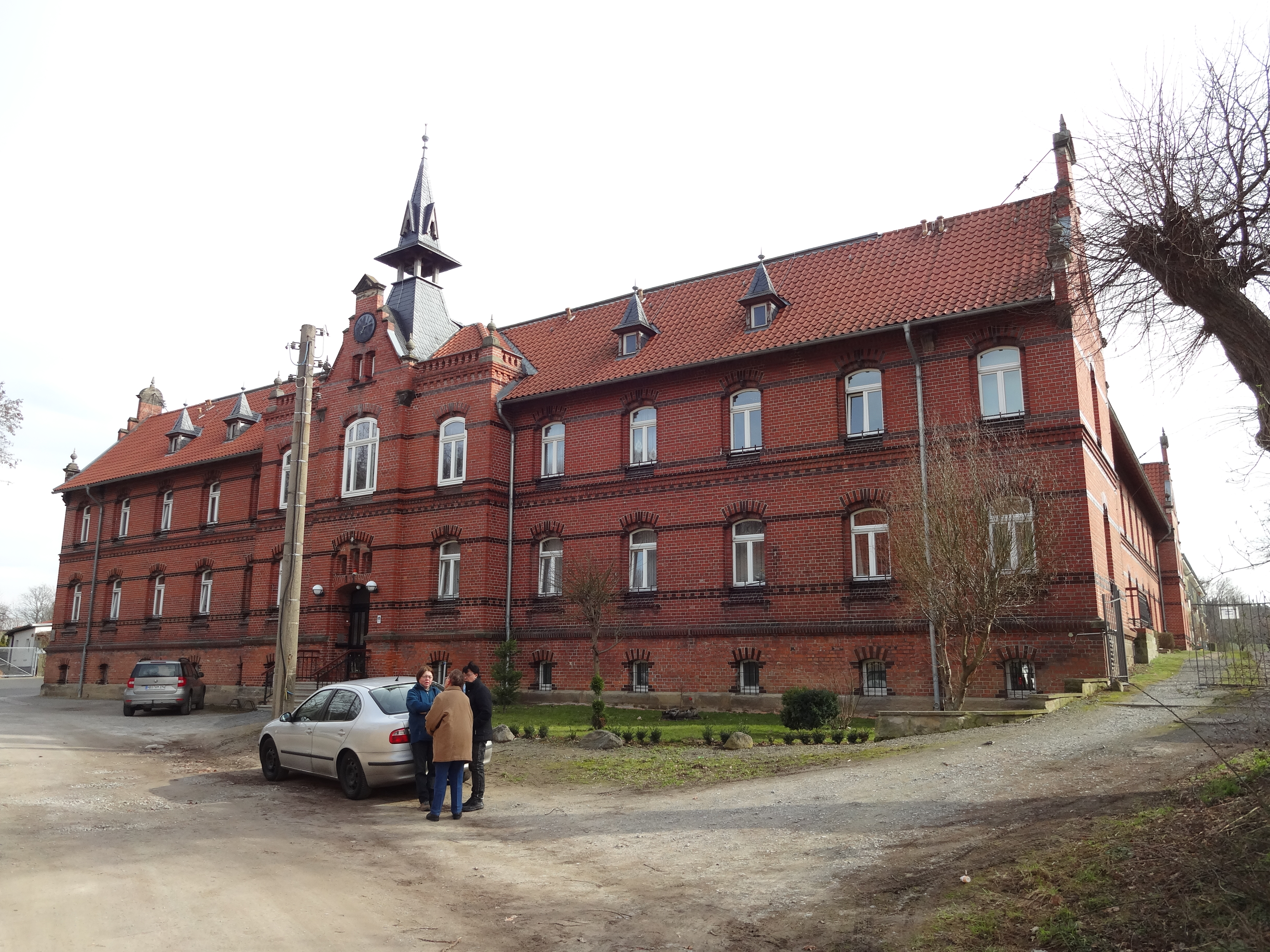 denkmalgeschütztes Hospital St. Katharina in der Hospitalstraße 2 in Derenburg, Ortsteil von Blankenburg (Harz)